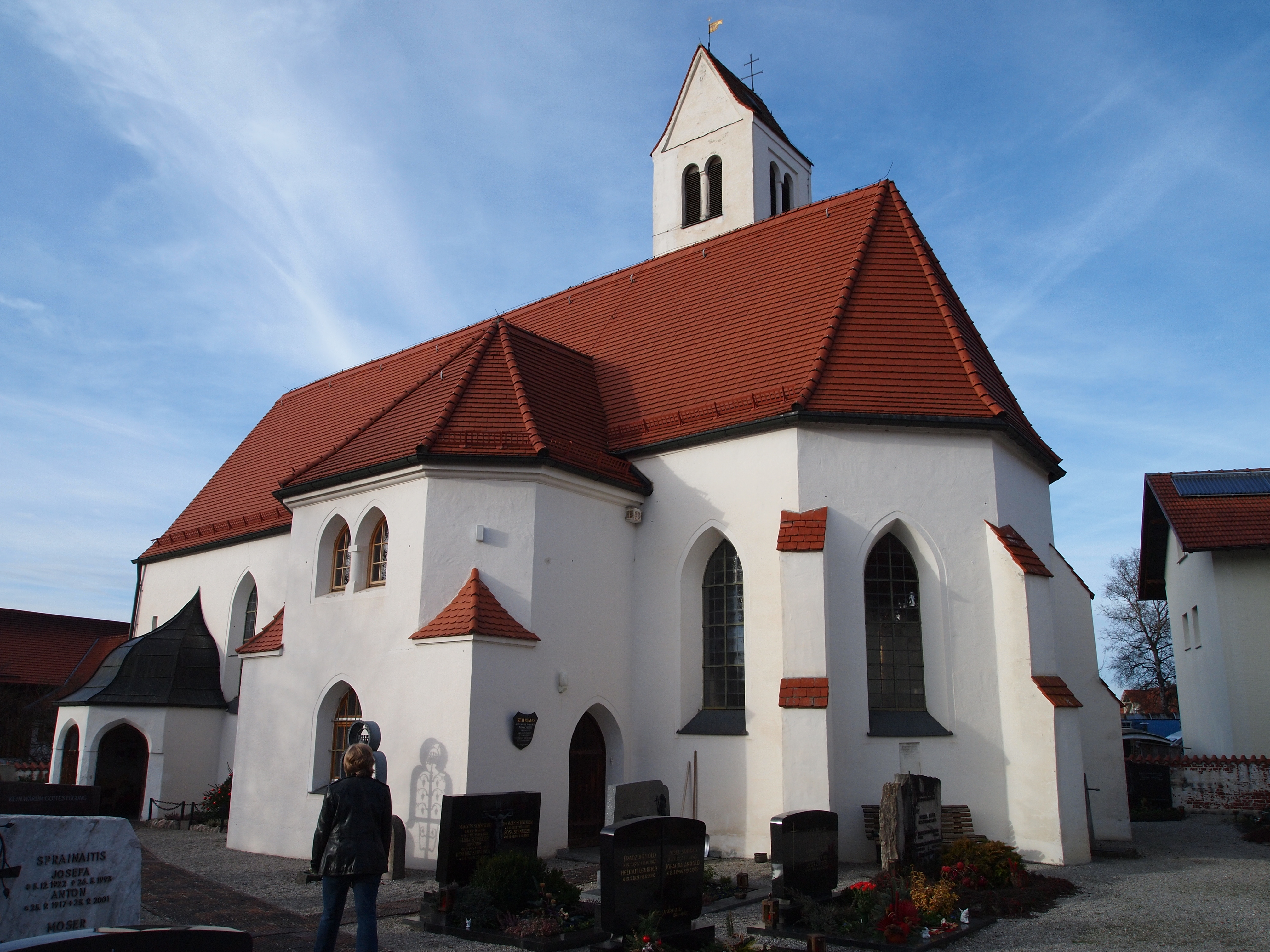 Pfarrkirche St. Thomas, Hirschzell, Aussenansicht vom Friedhofseingang mit angebautem Vorzeichen, Sakristei und Turm